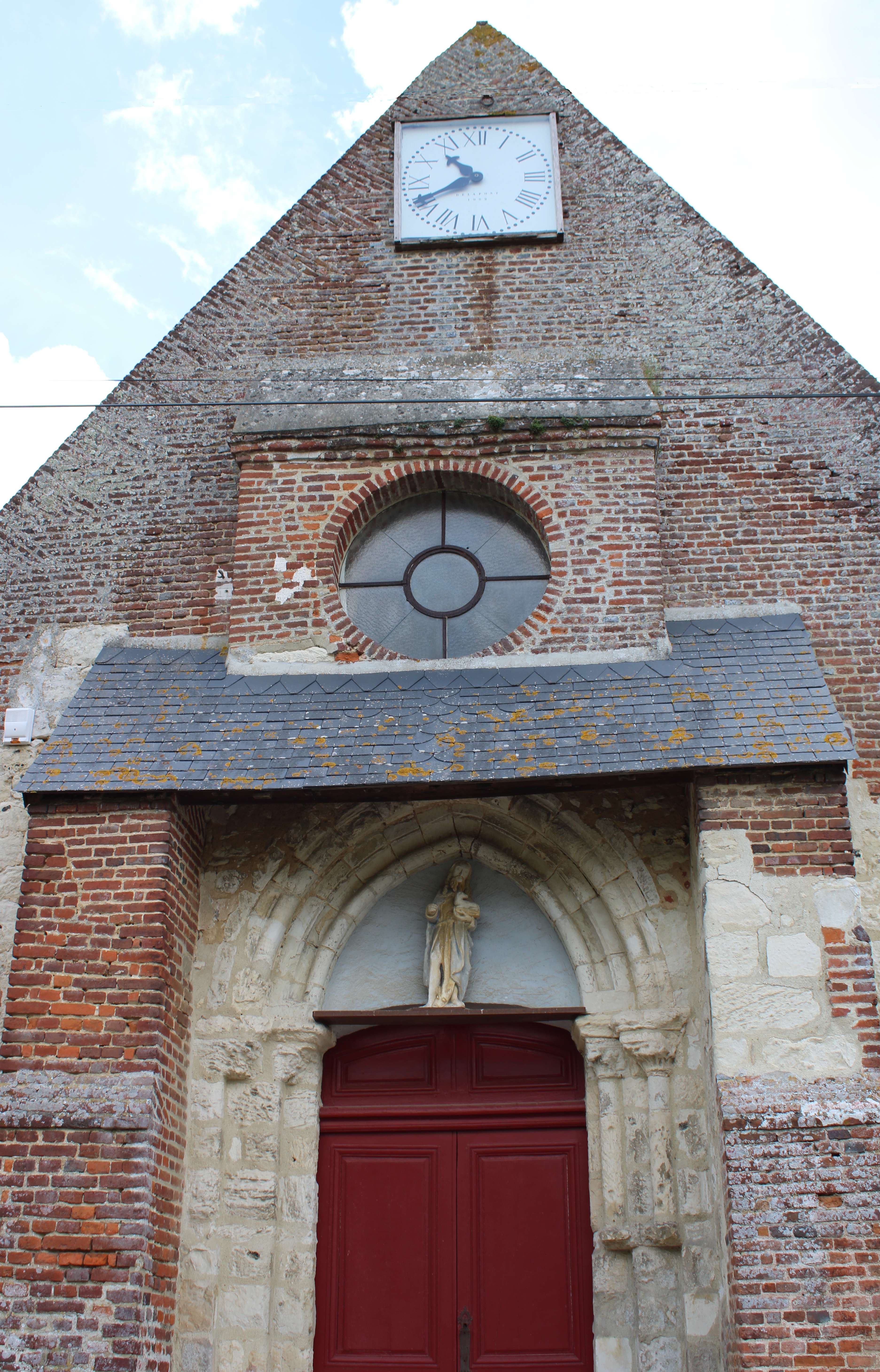 L'église